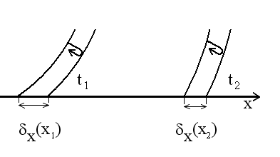 SLAR (oldalra néző légi fedélzeti radar) elvének magyarázatára szolgáló képsorozat 3. tagja